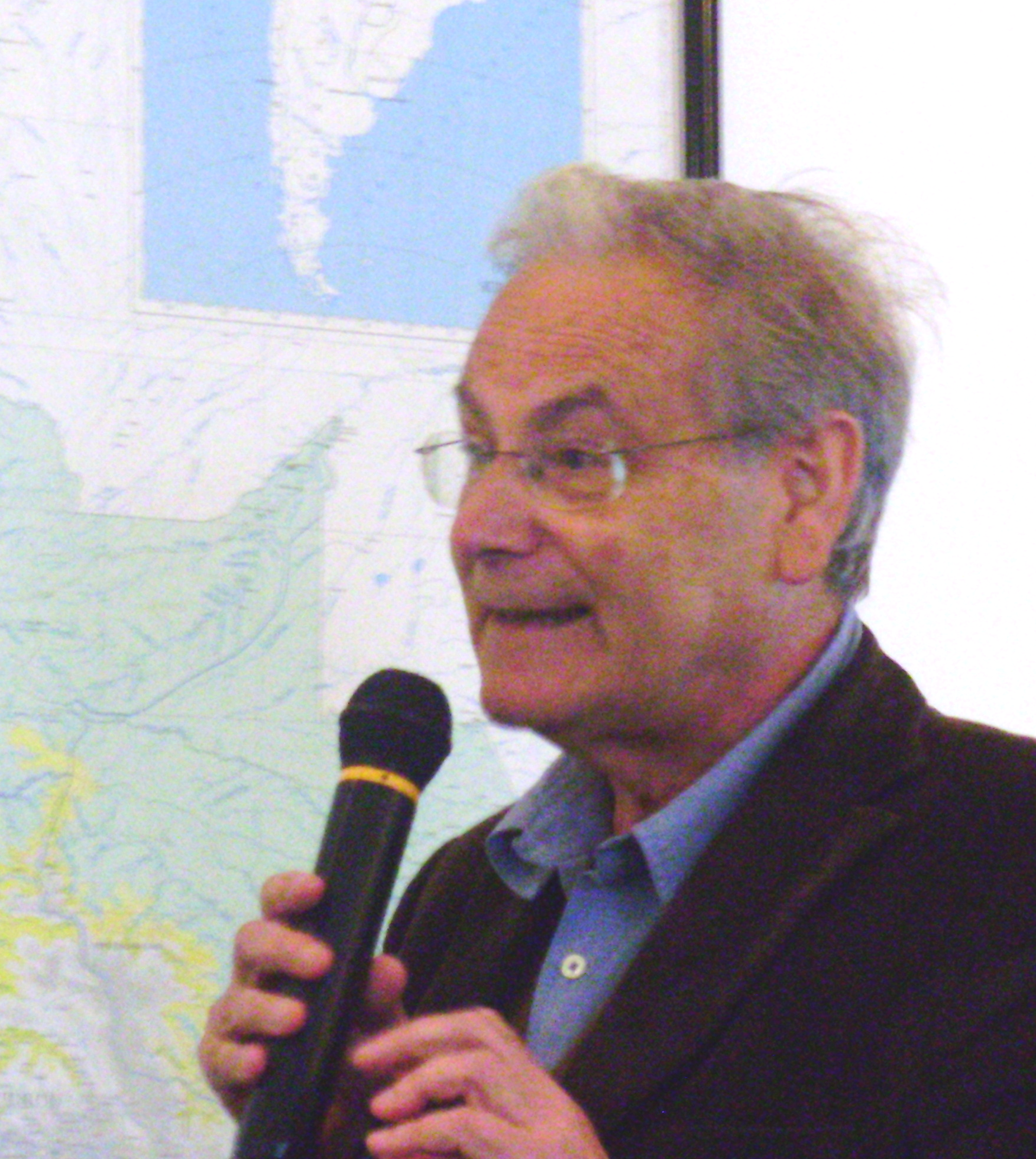 Joan Martínez Alier en conferencia en el Instituto de Estudios Peruanos en Lima - Perú